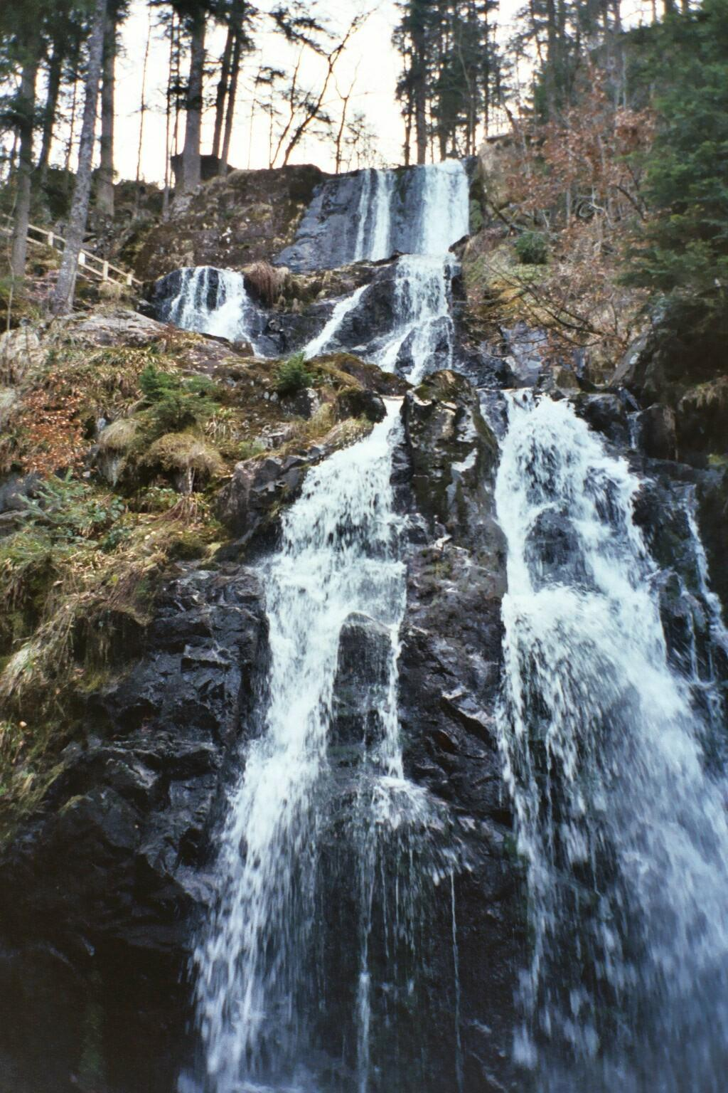 Grande Cascade de Tendon (88)